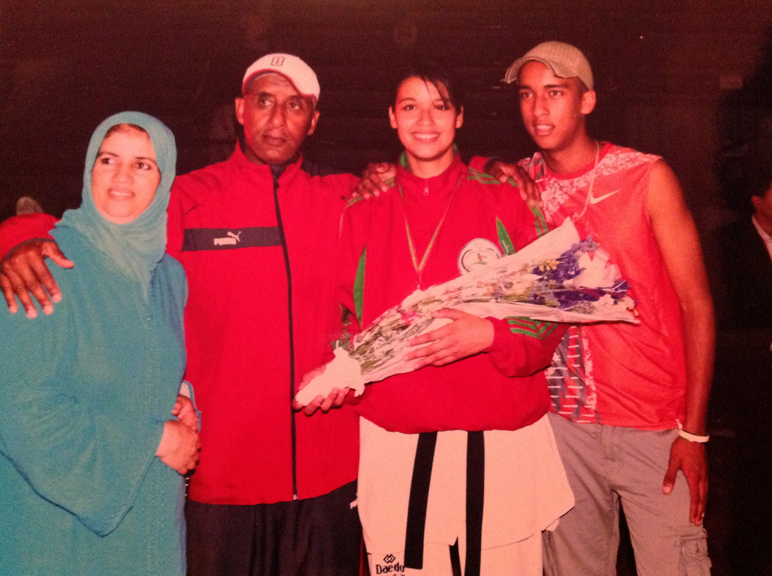 La famille Dislam